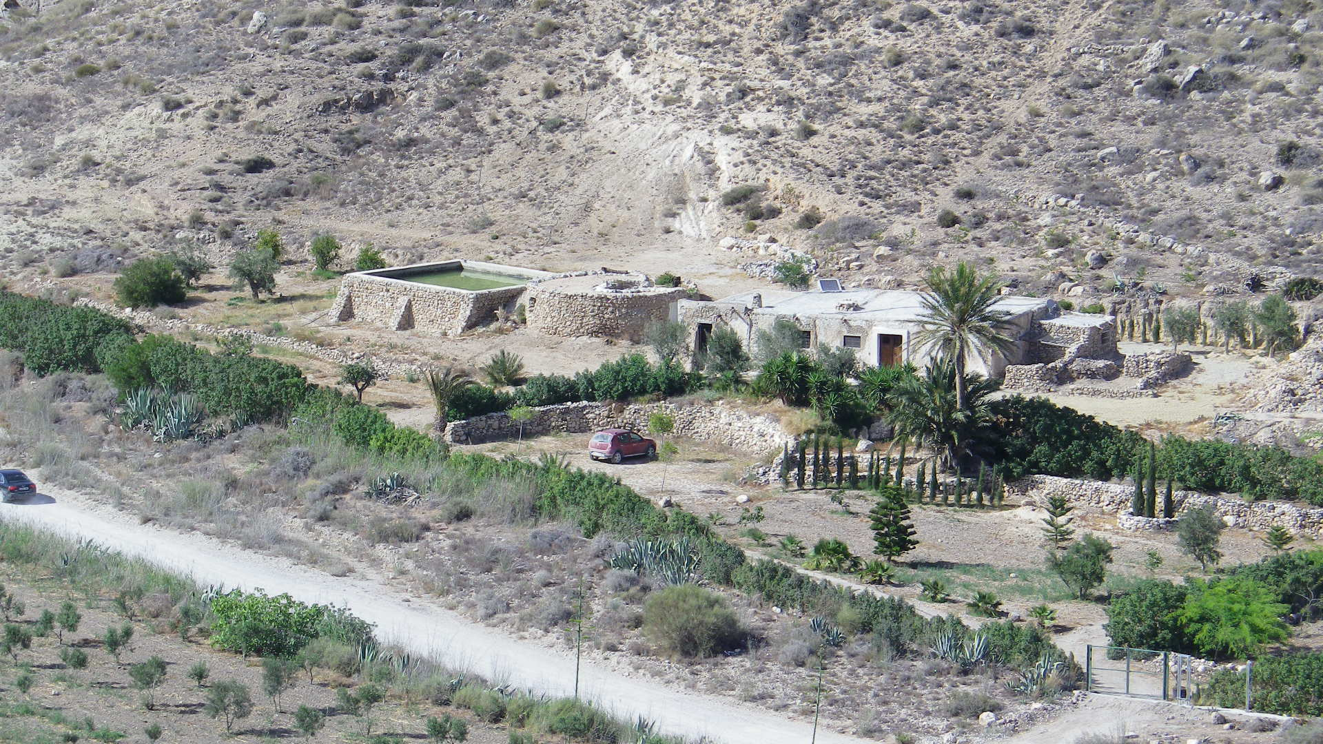 Construcción característica de la arquitectura rural del levante almeriense.